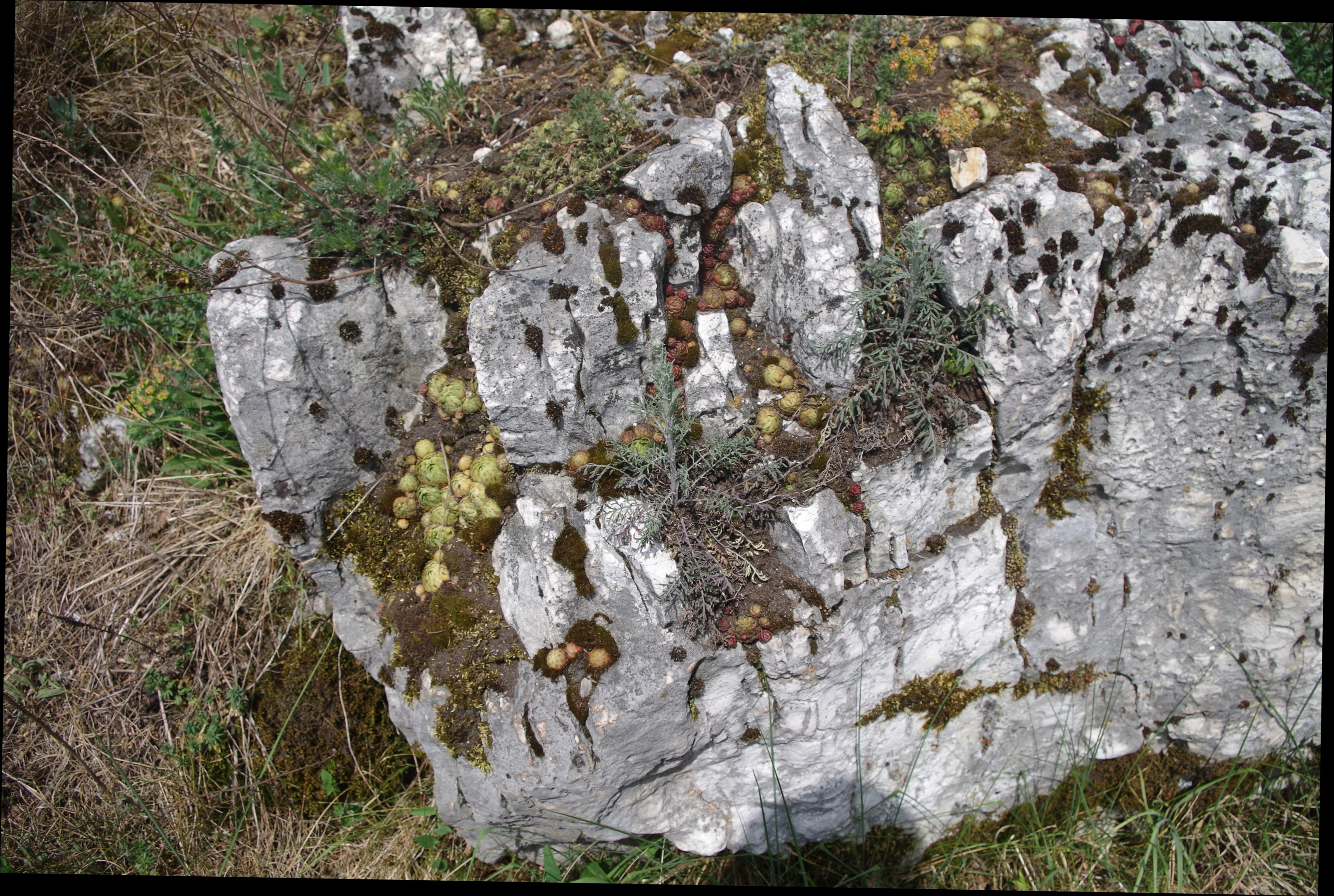 Murawa kserotermiczna na szczycie Góry Sowiej na Wyżynie Częstochowskiej